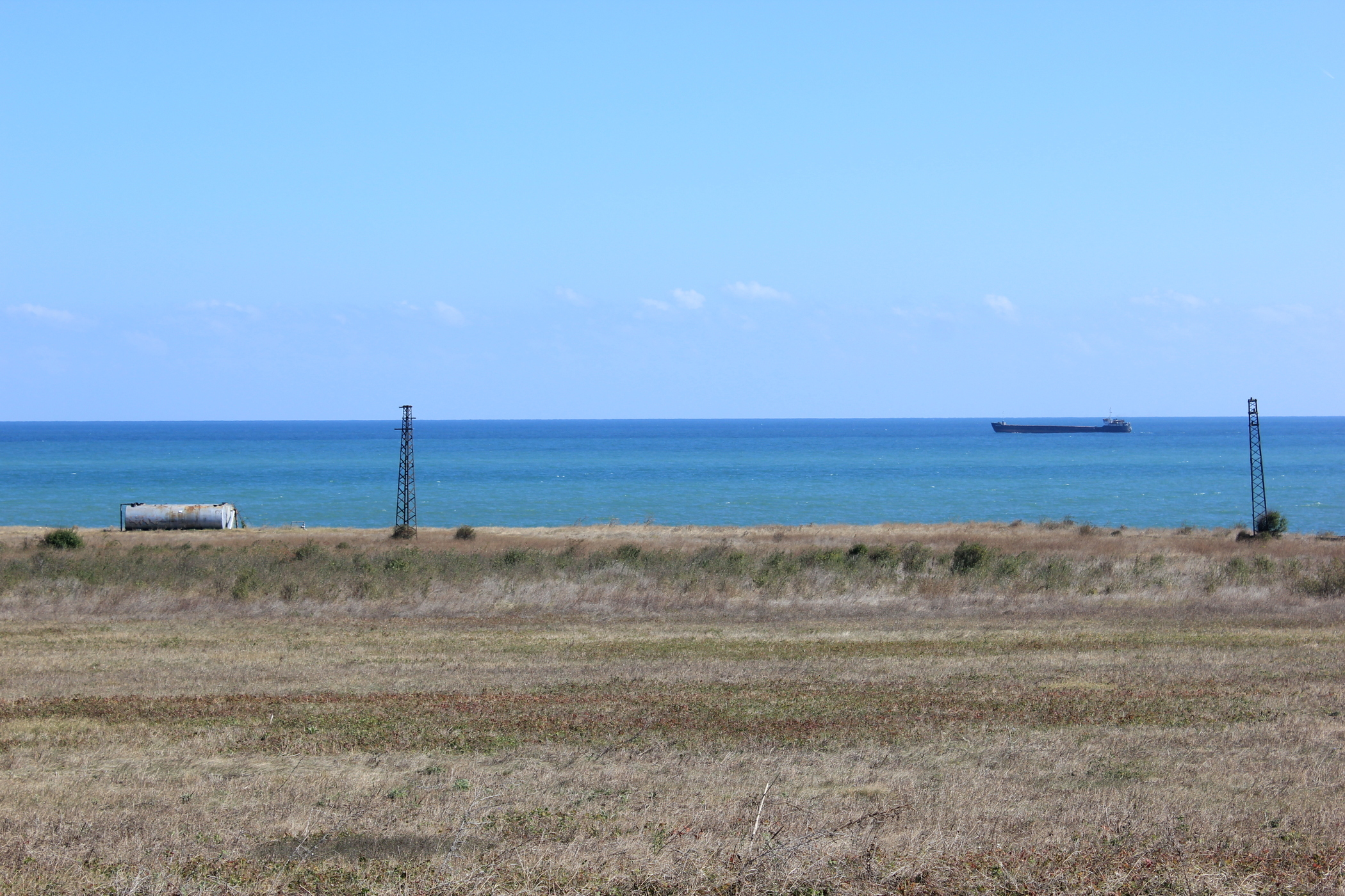 Am Schwarzen Meer in der bulgarischen Dobrudscha.